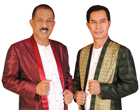 Wali Kota Ambon, Richard Louhenapessy dan Wakil Wali Kota Ambon, Syarif Hadler apda tahun 2018